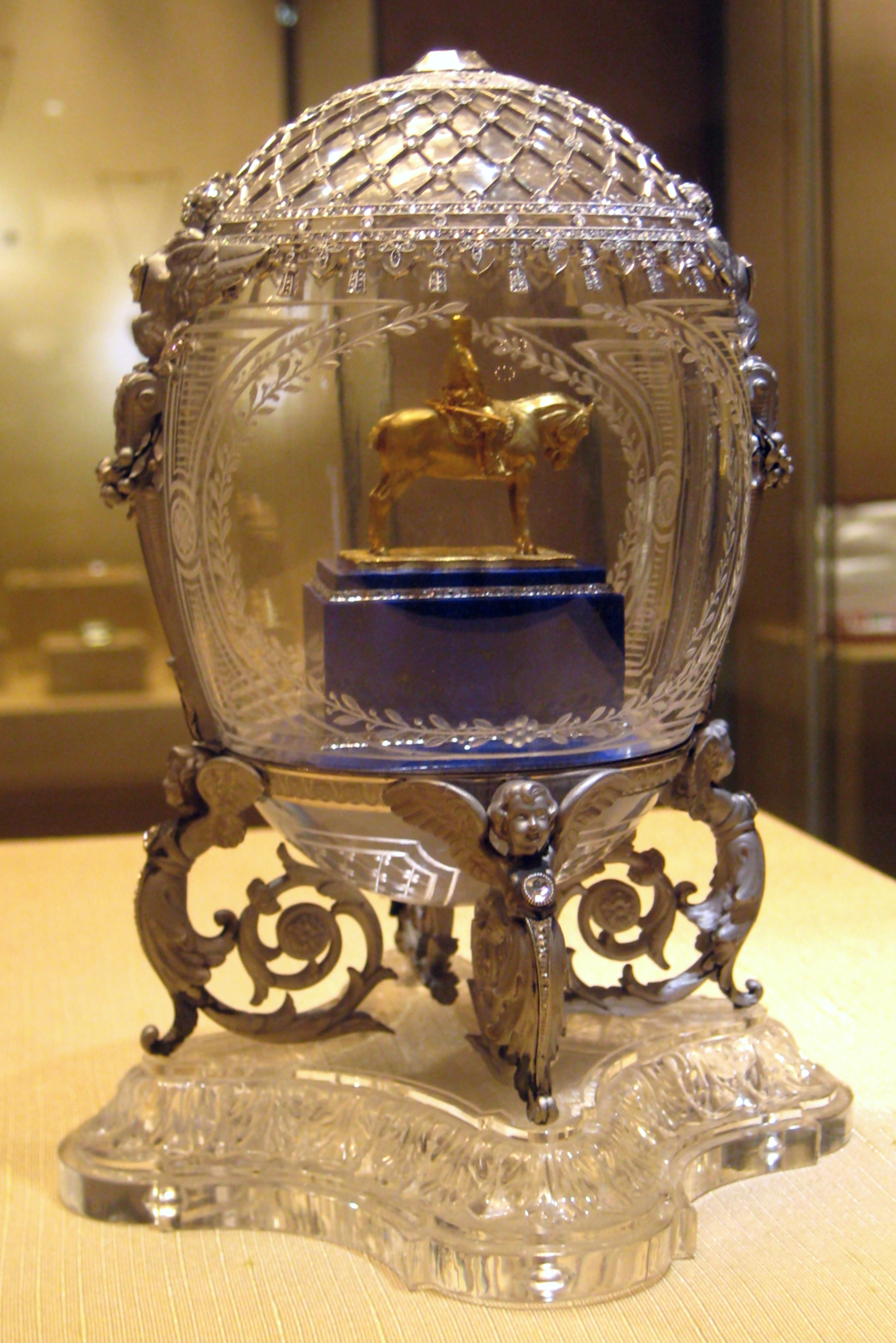 Яйцо Фаберже "Конный памятник Александру III"